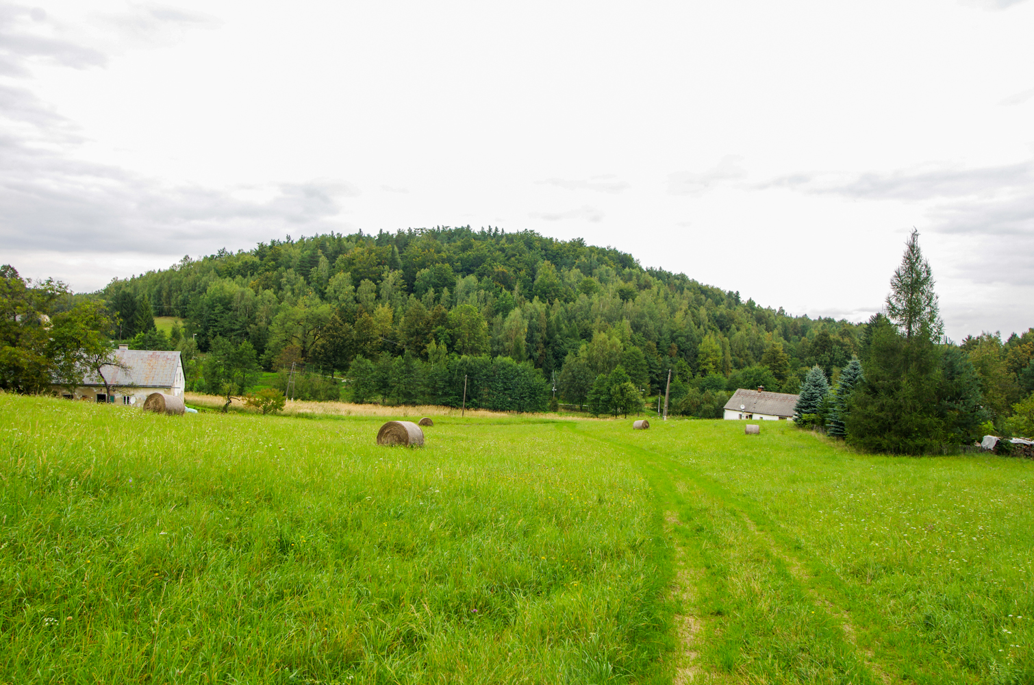 Přírodní památka Píšťala, pohled na lokalitu od jihovýchodu - zalesněný vrch Píšťala - 448 m n. m., okres Jeseník